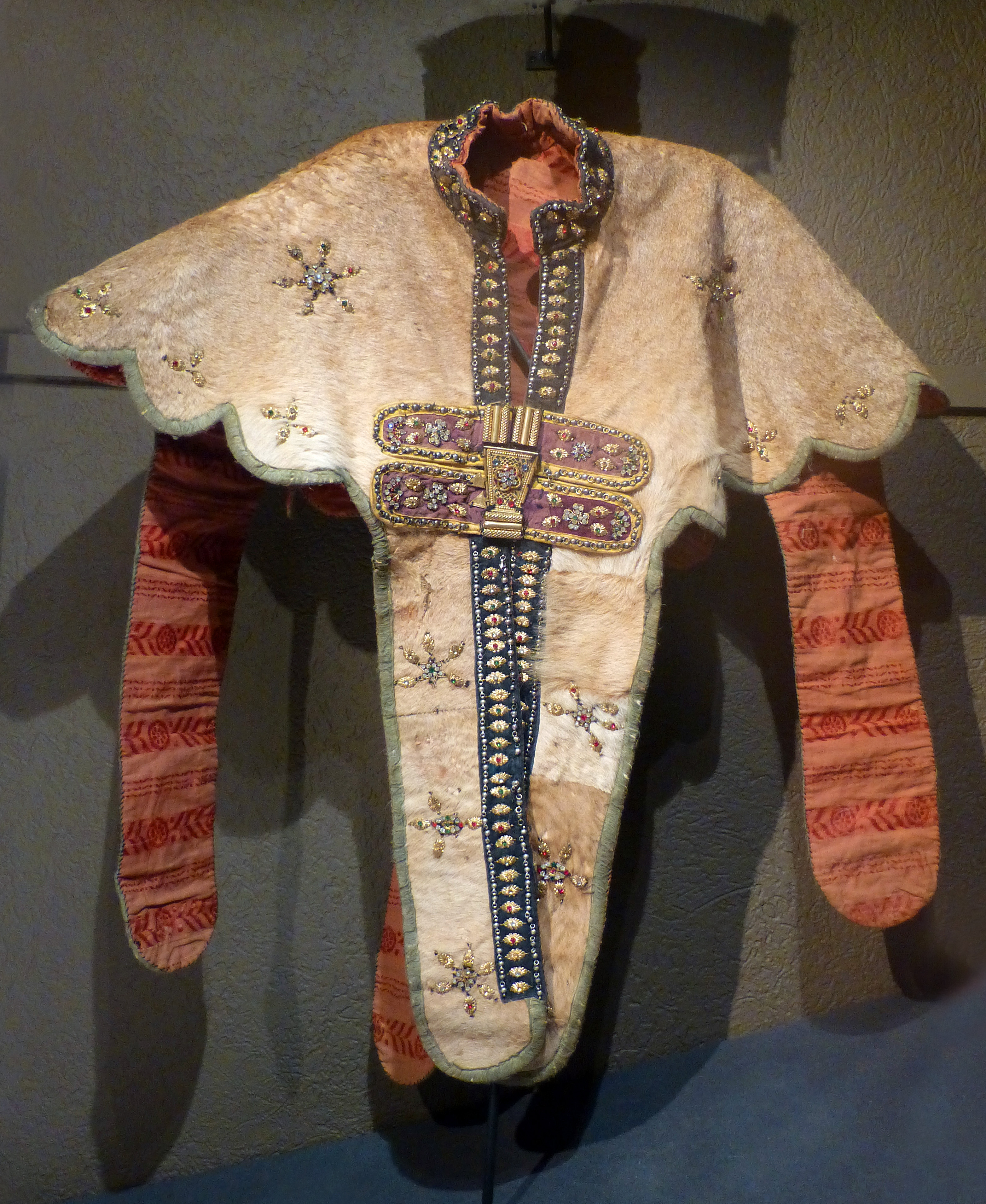 Cape guerrière rituelle (lemd) à quatre pans. Ouollega, Ethiopie. Peau de lion, pierres de couleur, broderies d'encolure. Musée d'histoire naturelle et d'ethnographie de Colmar. Don : Jean Doresse, 1999. N° d'inventaire : 999-205